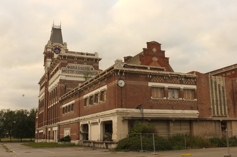 Brasserie-malterie Motte-Cordonnier (Inscrit) .